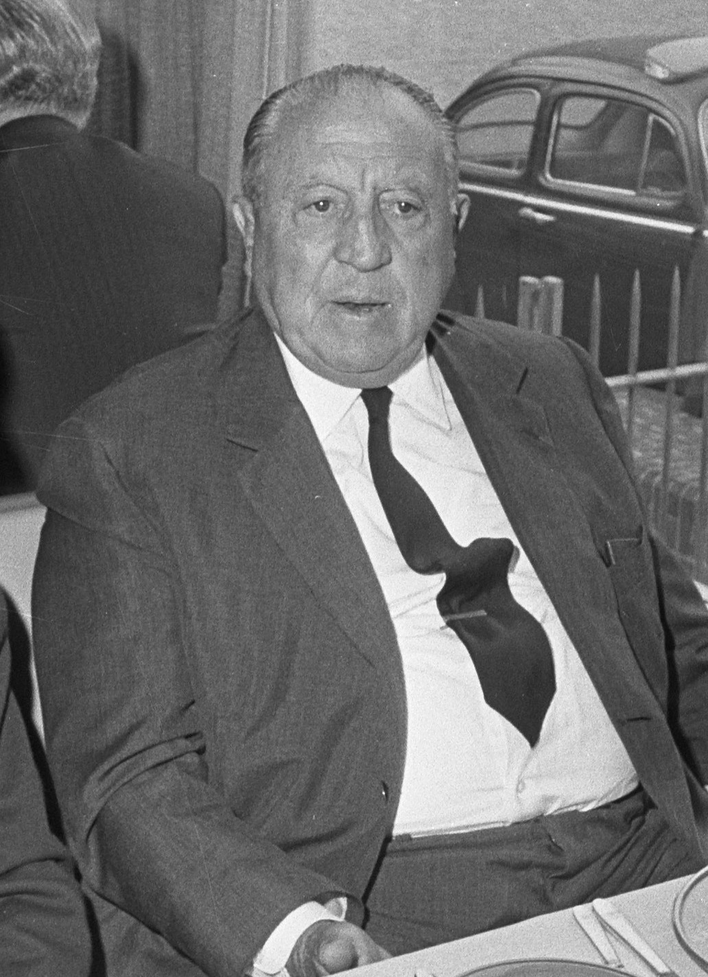 Real Madrid in Hilton Amsterdam. Voorzitter Real Madrid aan de lunch Bernabeu.